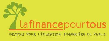 Logo officiel du site web "La finance pour tous" de l'IEFP (L'Institut pour l'éducation financière du public)